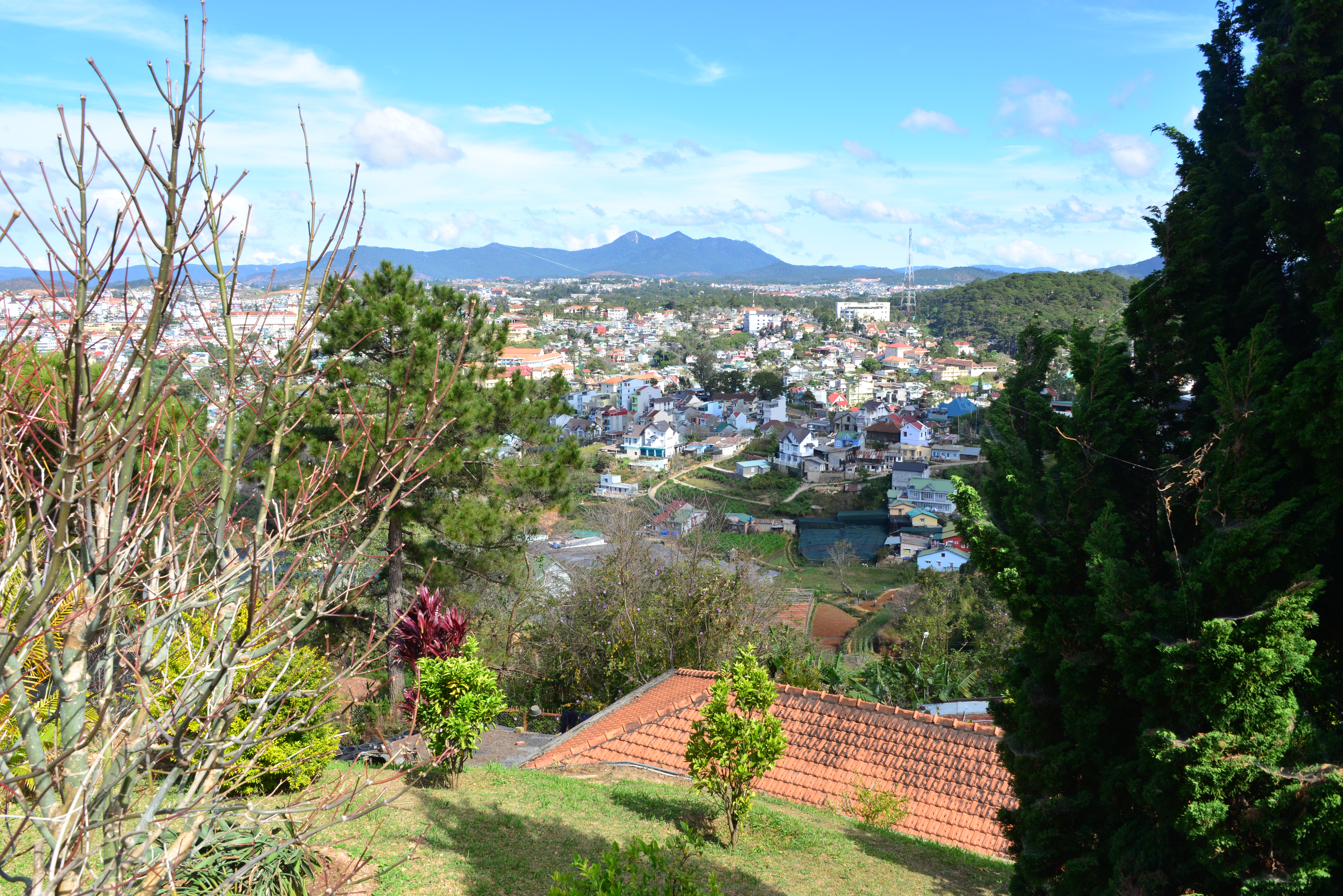 Vietnam